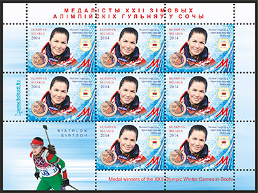 Надзея Скардзіна — бронзавы прызёр (біятлон)